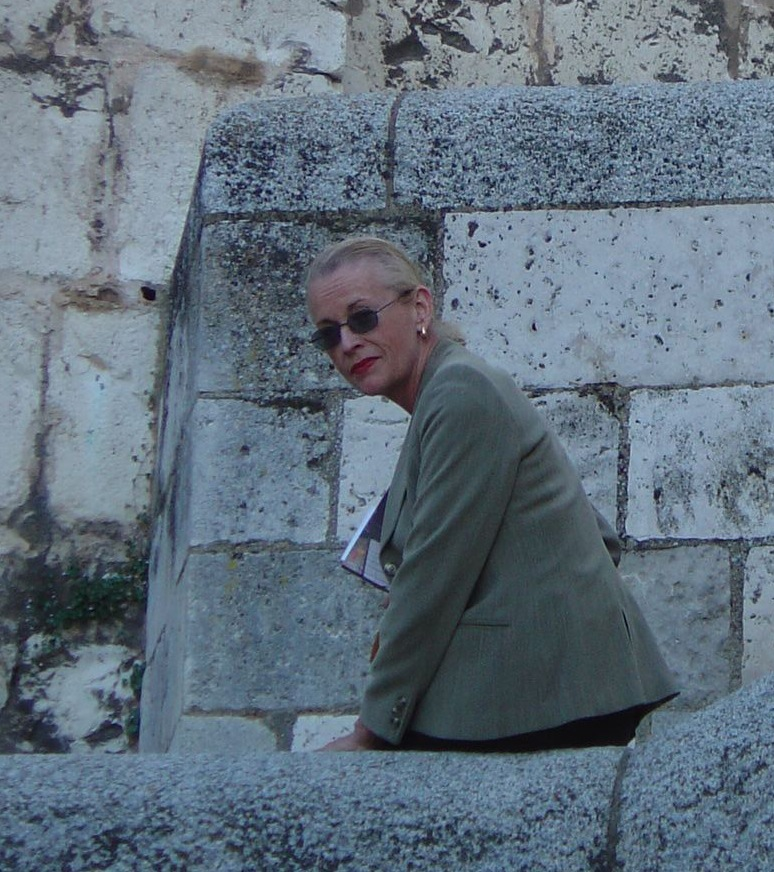 En Burgos en el año 2004